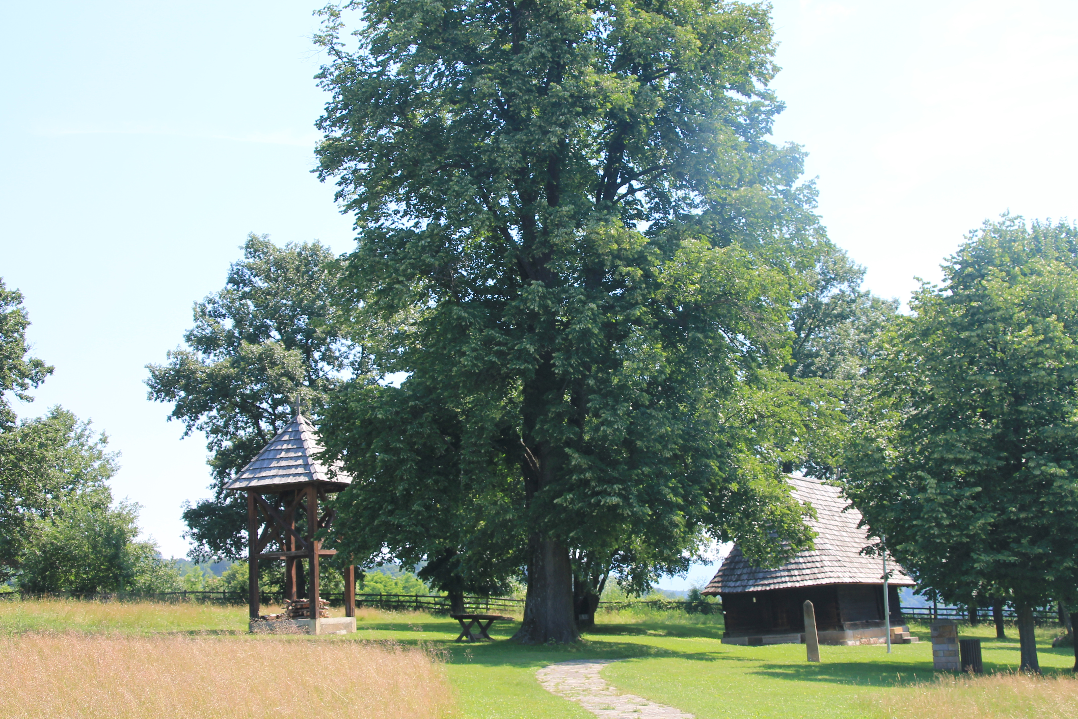 Crkva brvnara u Takovu